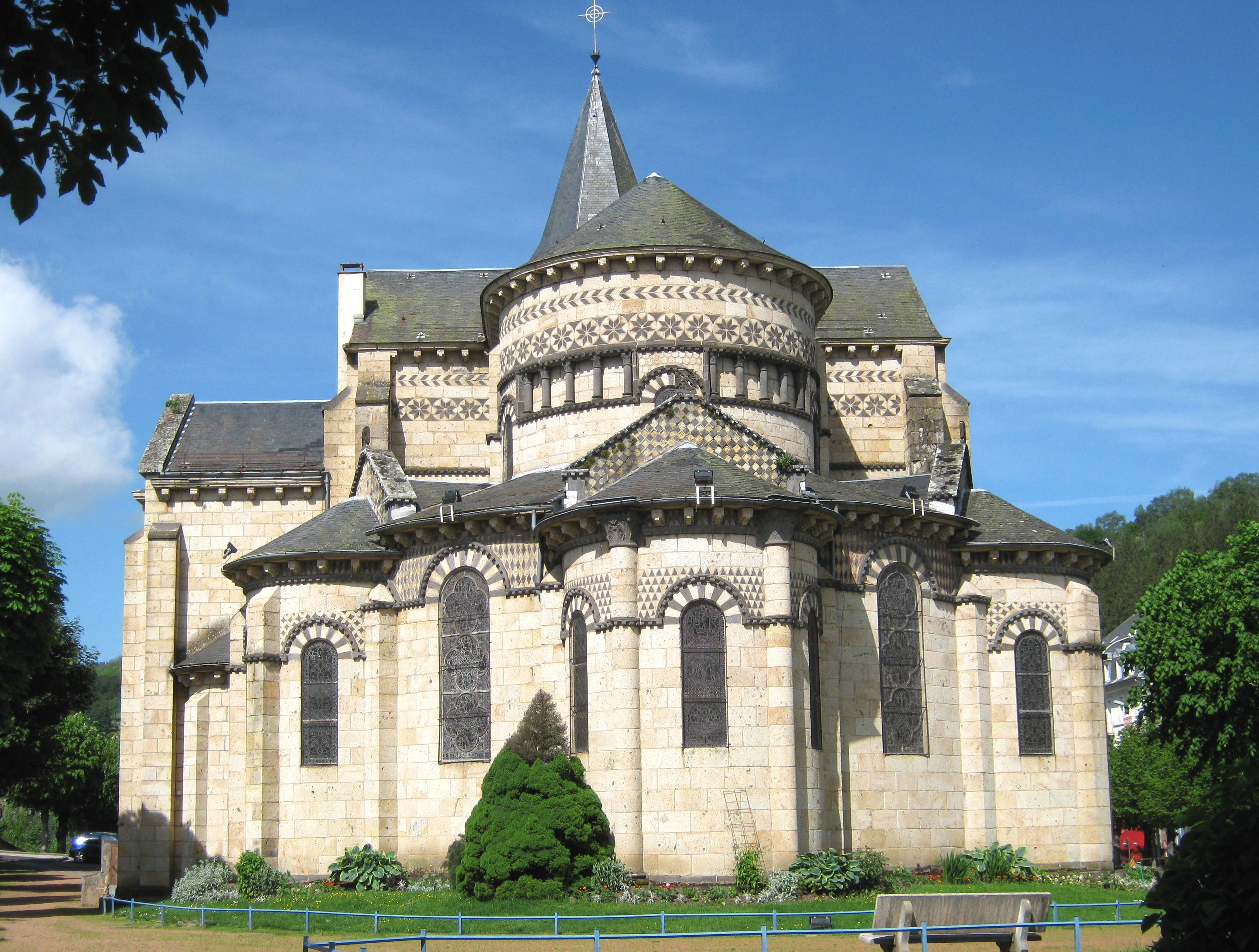 La Bourboule im Département Puy-de-Dôme der Region Auvergne-Rhône-Alpes im Kanton Le Sancy. Aufnahme von 2016 aus Osten.